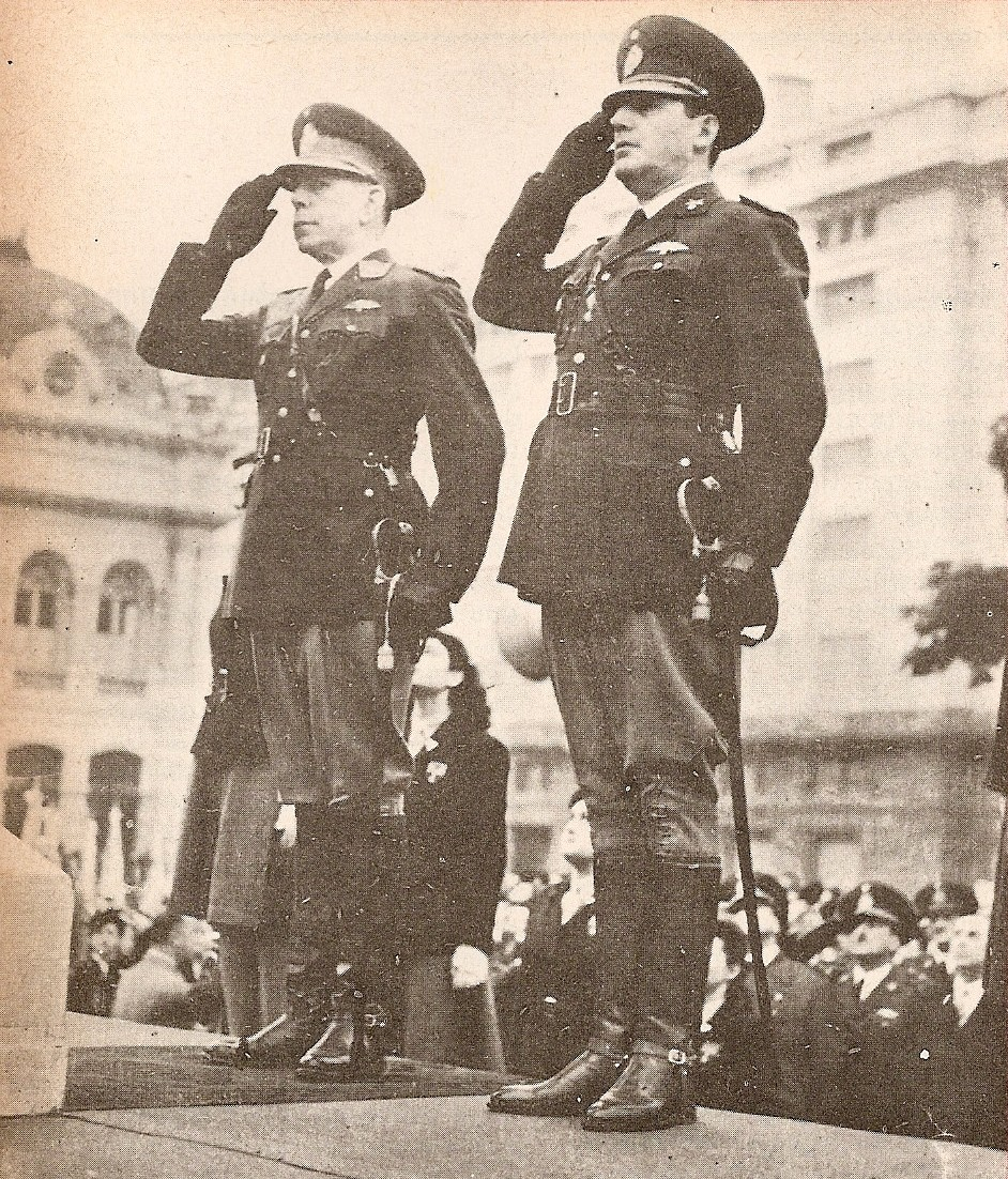 Edelmiro Farrell y Juan Perón. Abril 1945